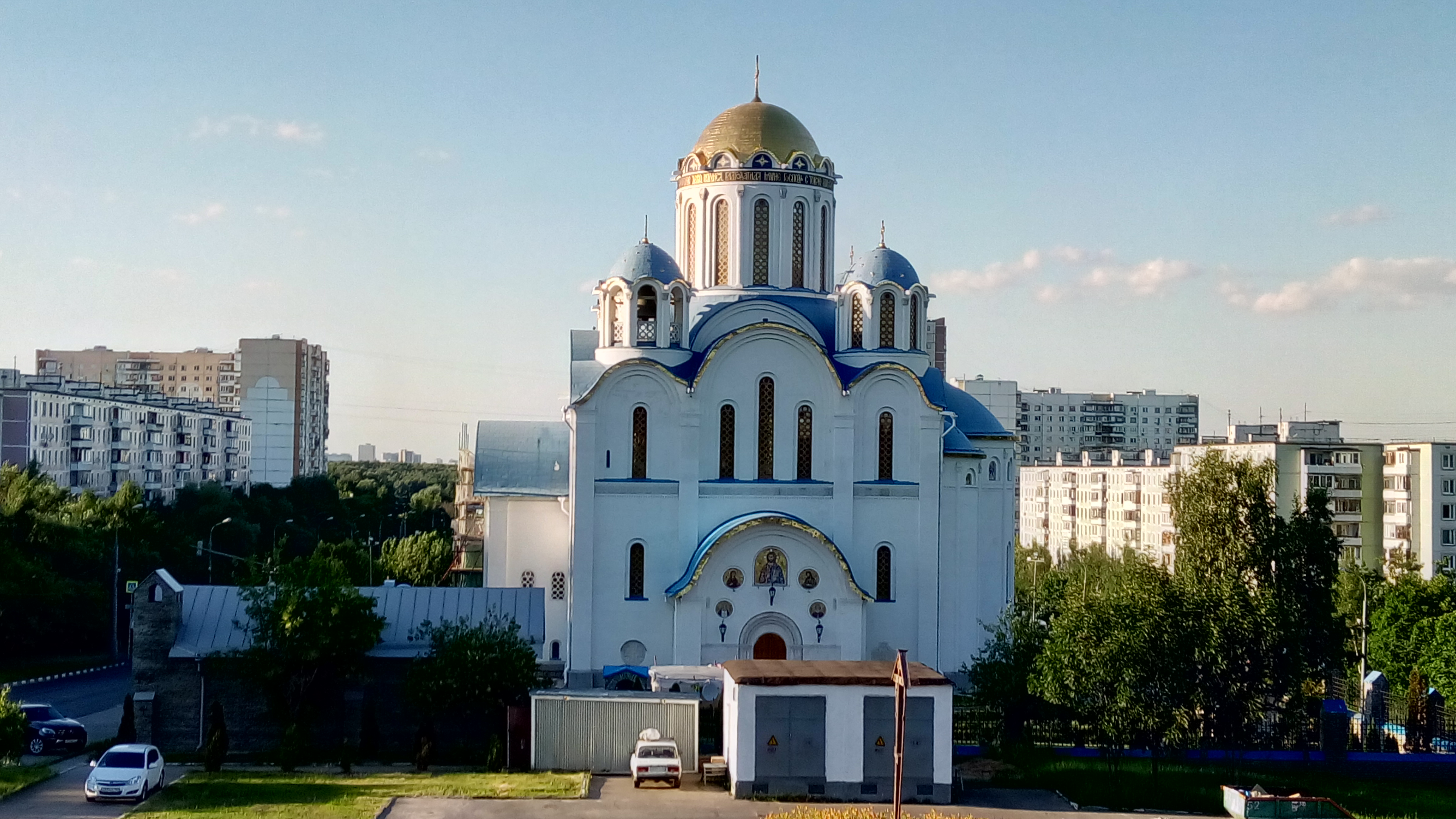 Храм Покрова Пресвятой Богородицы в Ясенево (Москва)